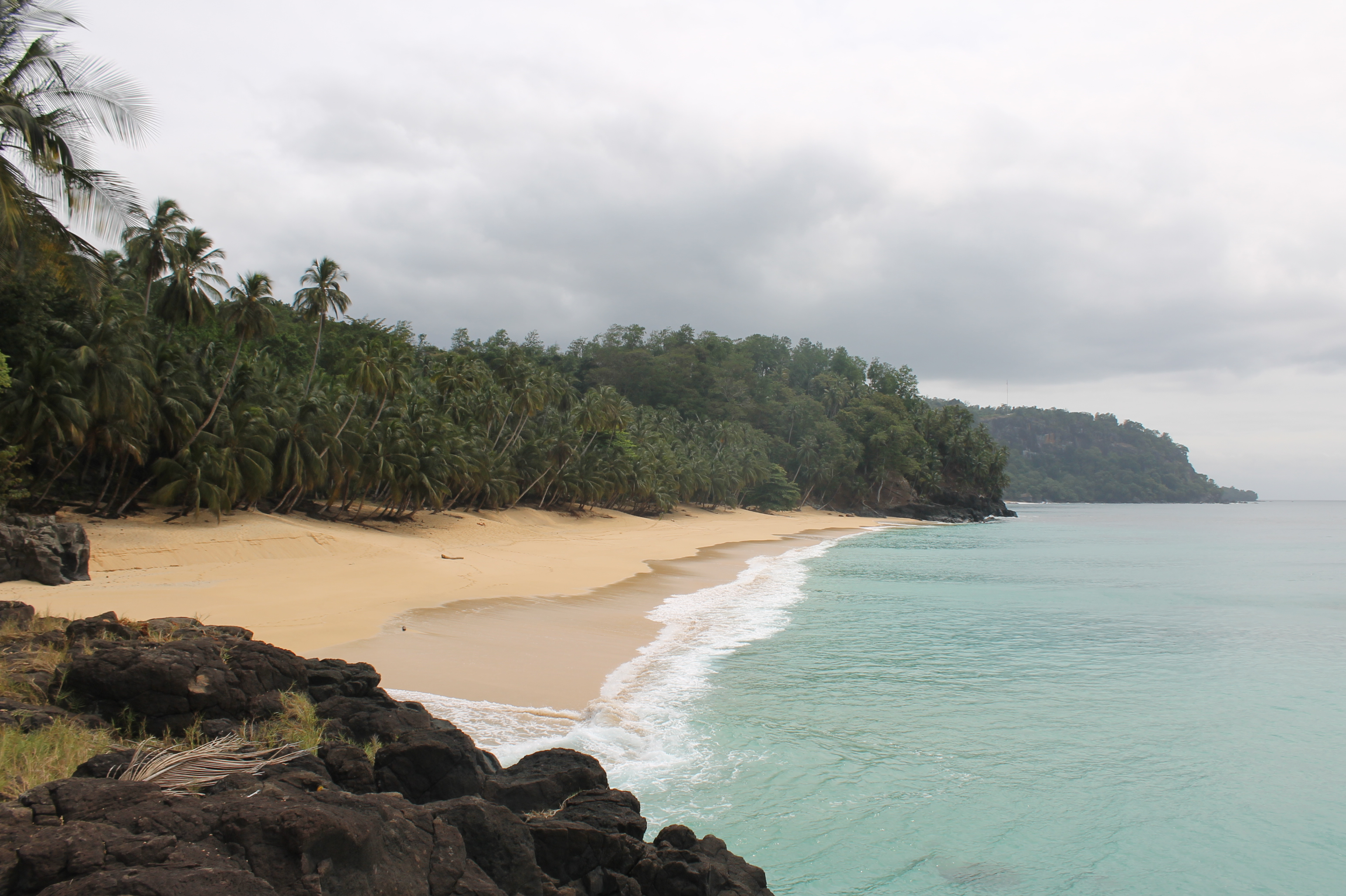 Praia Macaco This is an image of the Biosphere Reserve: Island of Príncipe Biosphere Reserve